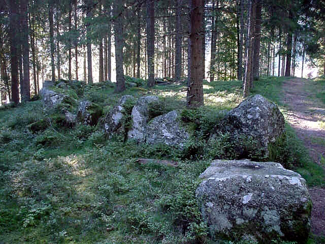 Steinkreise am Schluchsee - Schluchsee - Baden-Württemberg - Deutschland